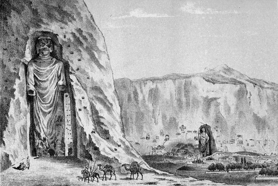 Buddhas of Bamiyan, from: Iwan Lawrowitsch Jaworski: Reise der russischen Gesandtschaft in Afghanistan und Buchara in den Jahren 1878-79, Jena : Costenoble, 1885.